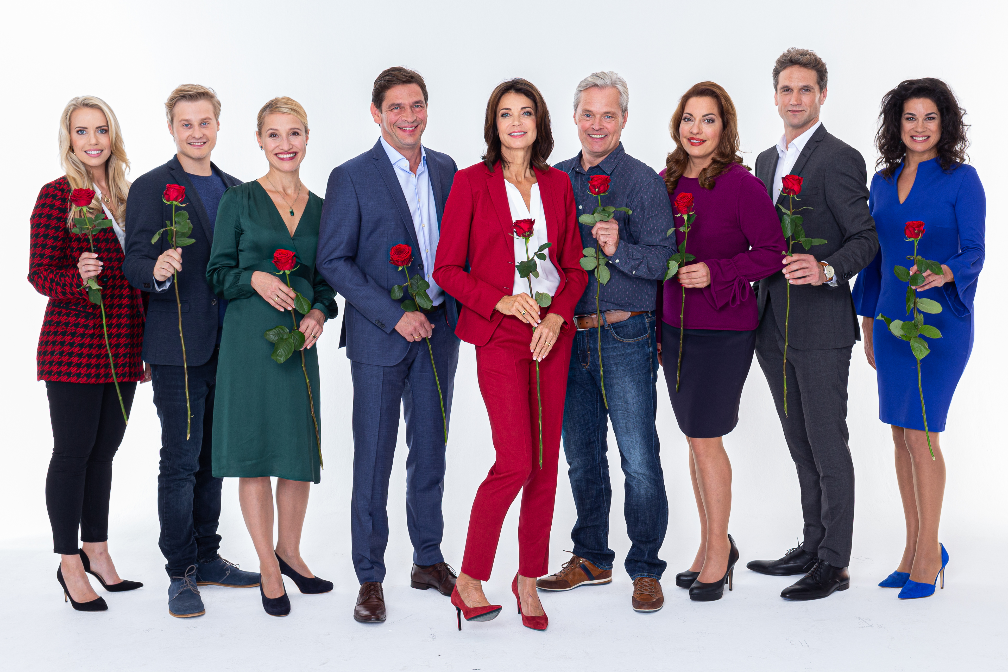 TV, ARD, Cast "Rote Rosen" Staffel 16; Gruppenfoto Hauptcast 16. Staffel